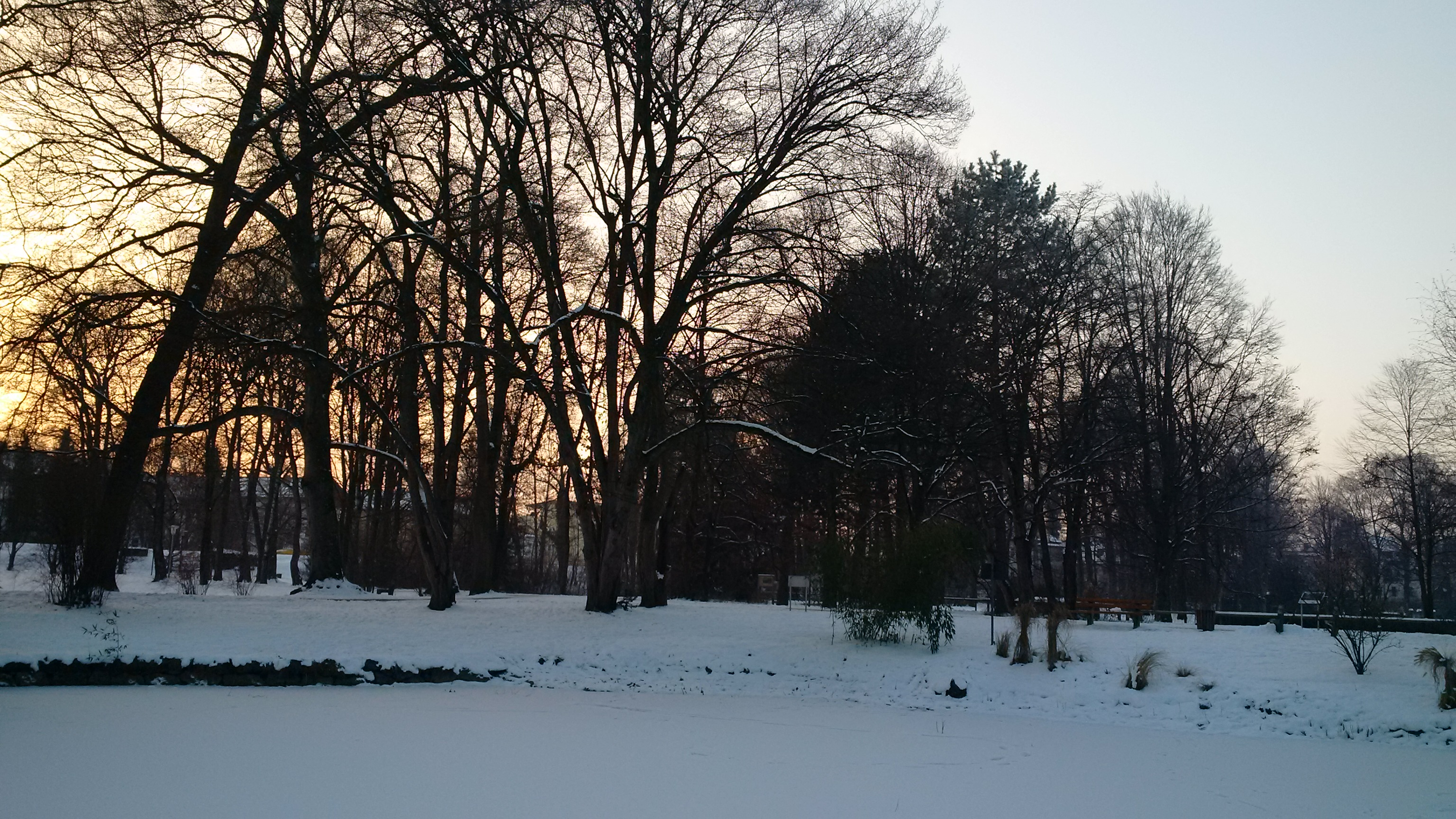 Der Kurpark in Bad Aibling im Winter 2016.